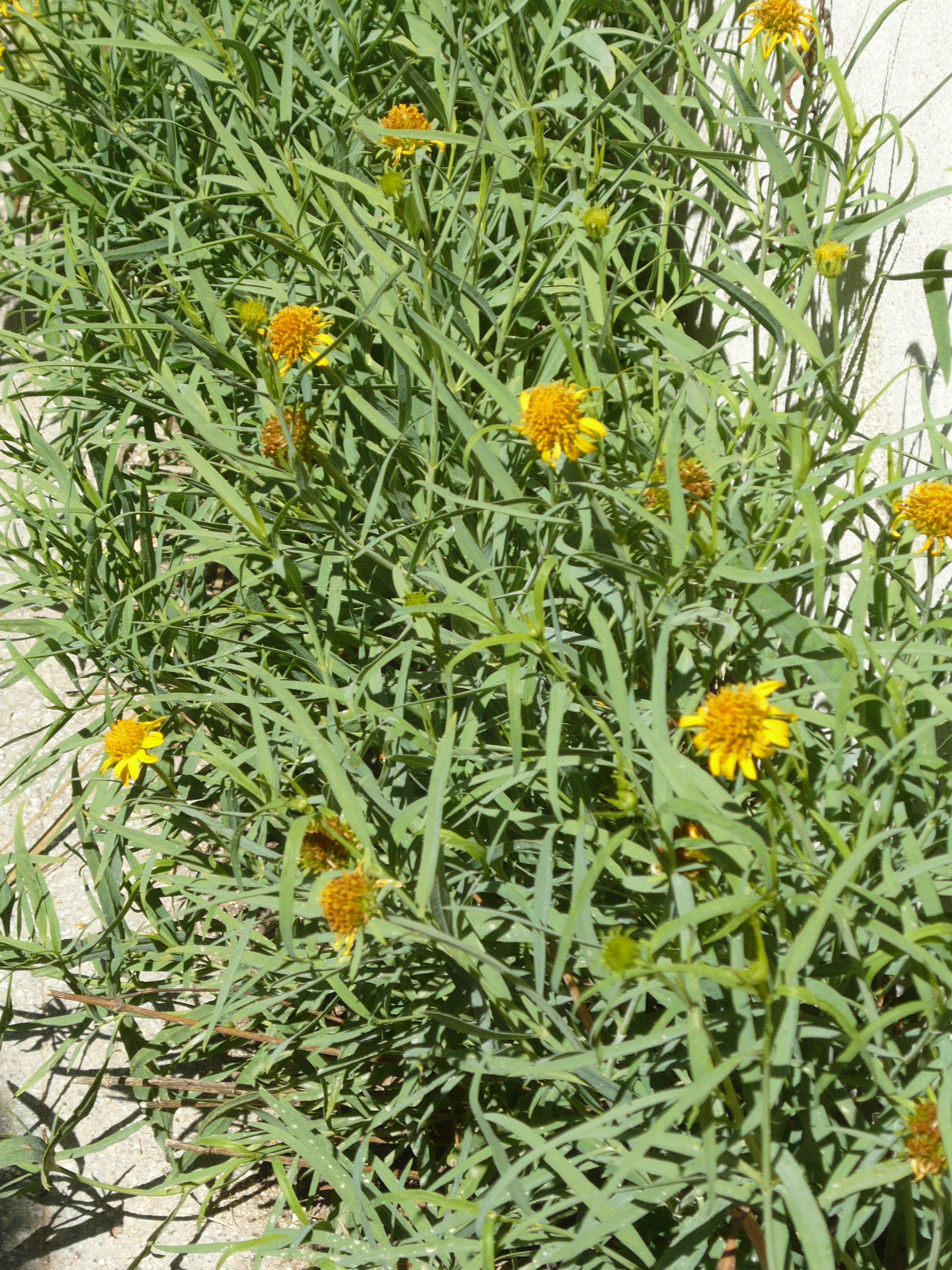 Wedelia glauca (=Pascalia glauca), subespontánea. Real Jardín Botánico de Madrid.